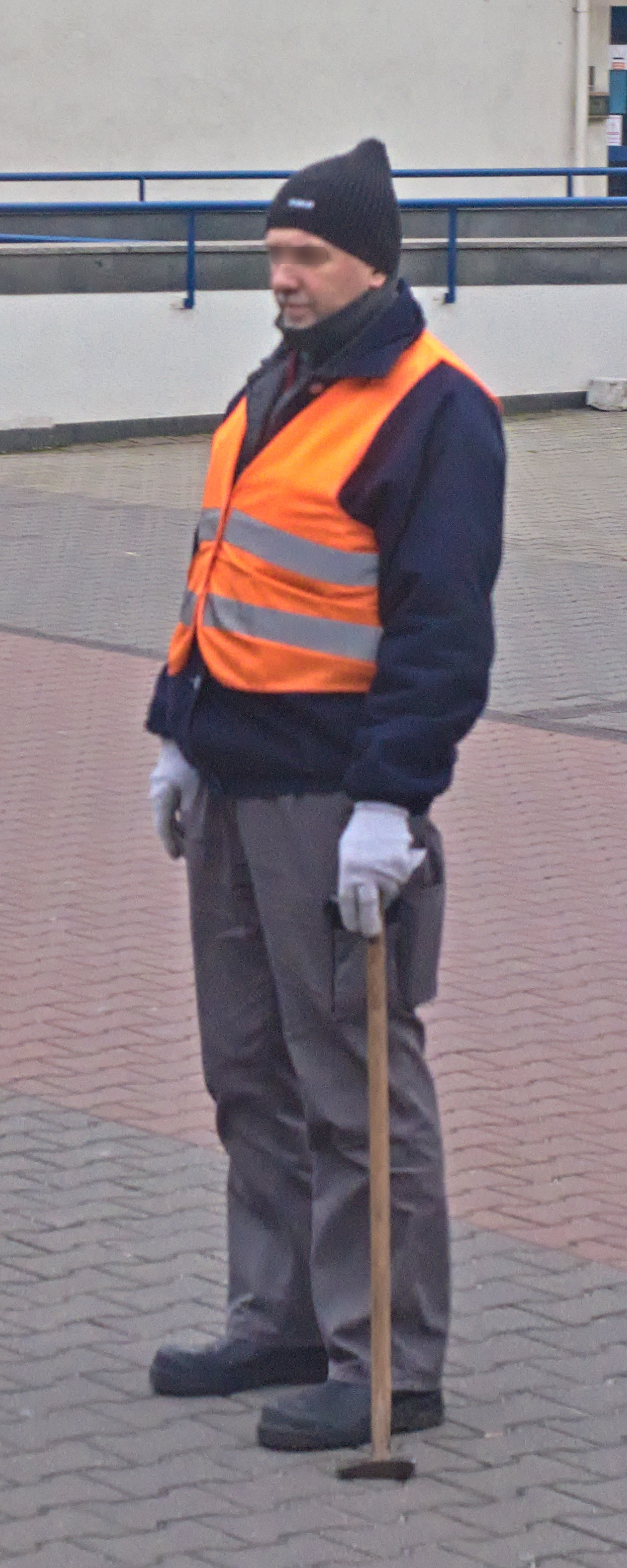 rewident taboru kolejowego PKP Intercity na stacji kolejowej Lublin Główny w pracy z młotkiem rewidenckim w prawej dłoni; spogląda na wcześniej przez niego rewidowany odjeżdżający pociąg PKP Intercity Morcinek do Wrocławia (zdjęcie odbite w pionie)